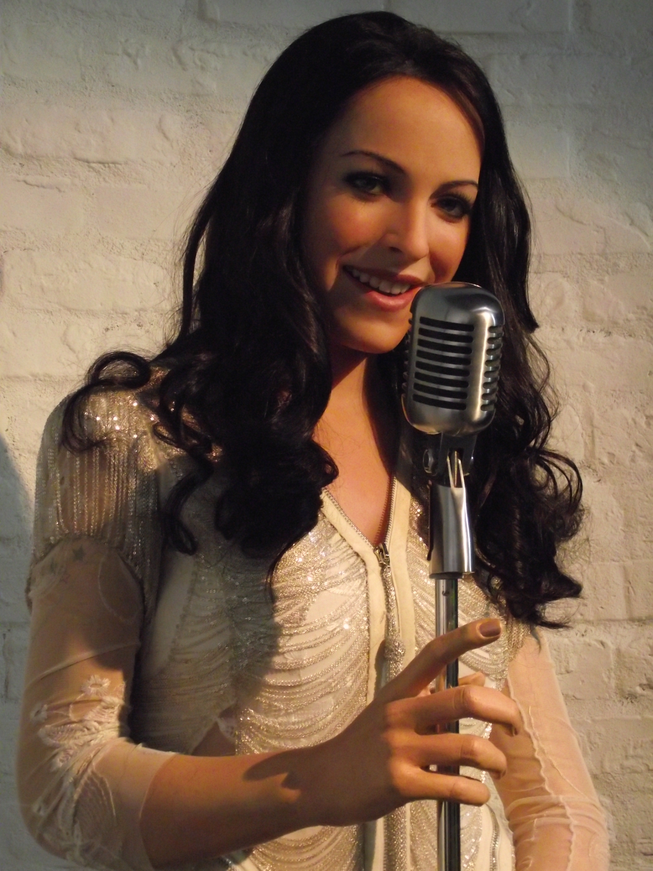 Marie-Mai au Musée Grévin Montréal